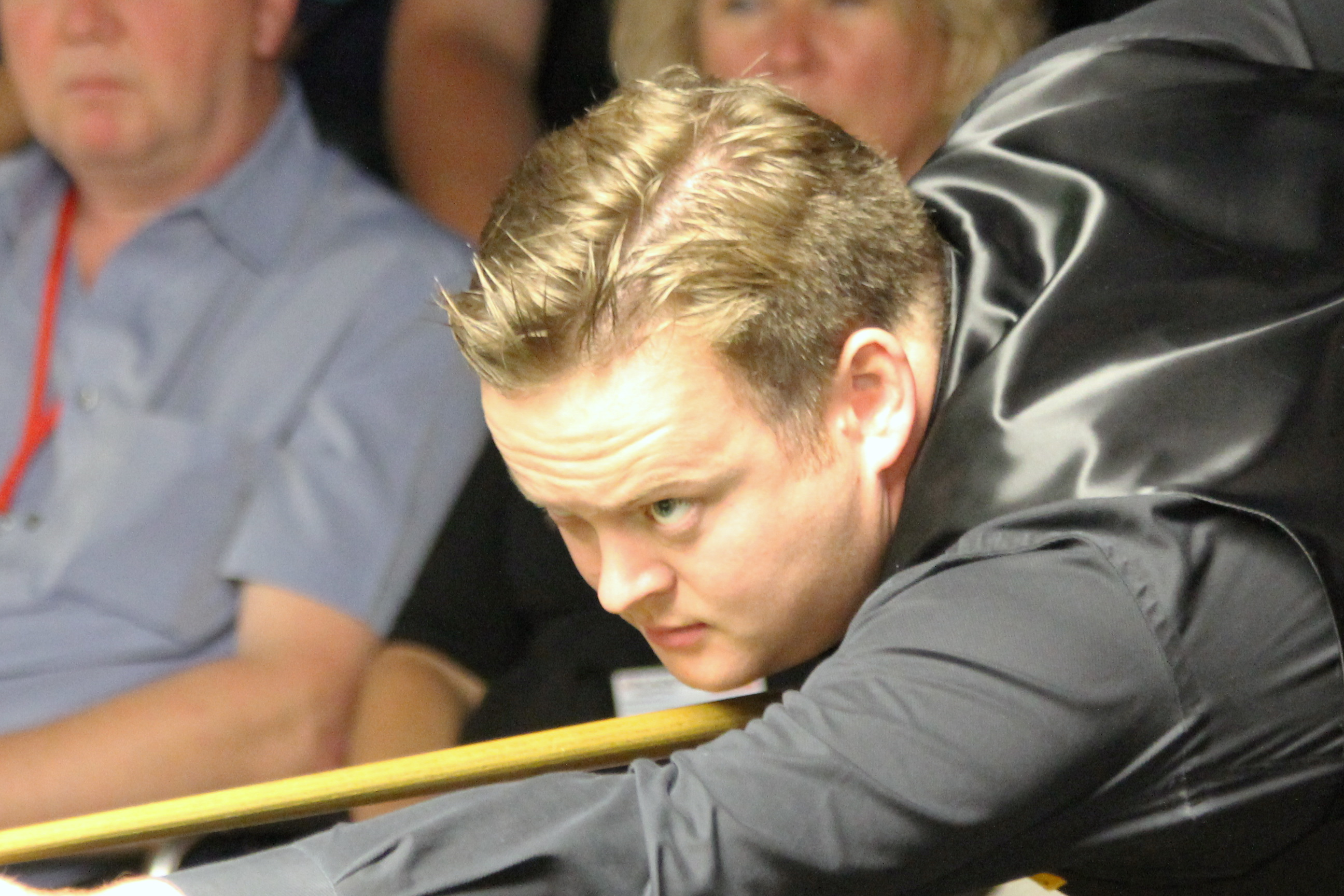 Shaun Murphy beim Paul Hunter Classic 2012